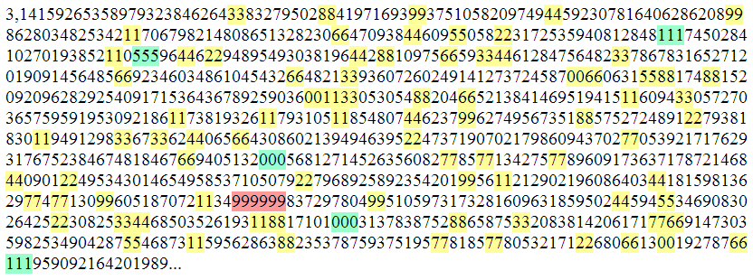 Utgick från för att skapa en svenskanpassad version med komma istället för punkt och utökade till totalt 1000 decimaler.